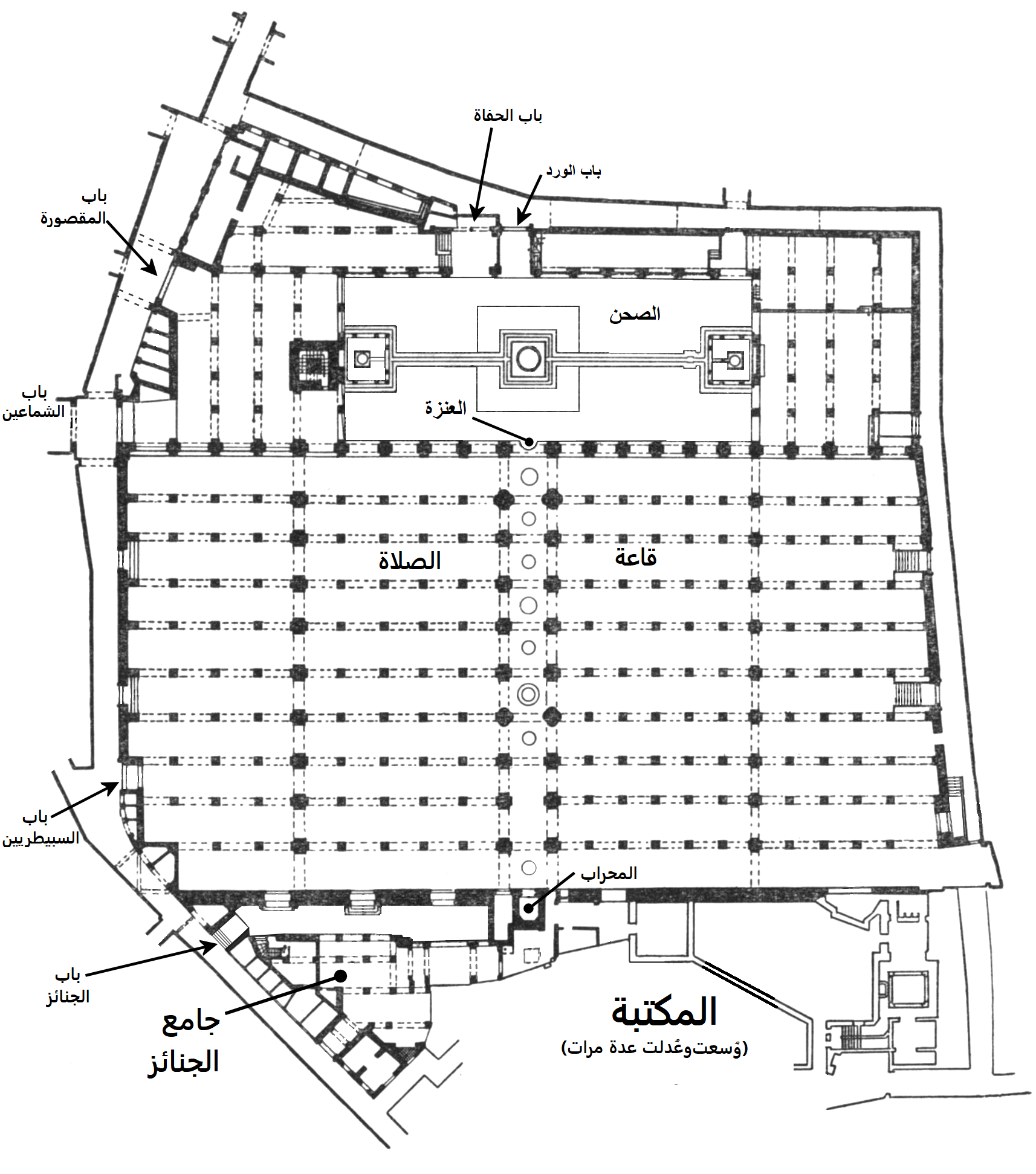 مخطط الأرضية لمسجد القرويين ، من مخطط الأرضية الذي أنشأه إ. باوتي (Edmond Pauty ، 1923 ، "Le plan de l'Université Qarawiyin à Fès" ، Hespéris ، IV) وتكييفها وإعادة نشرها من قبل عدد من المؤلفين ، على وجه الخصوص هنري تيراسي. أخذت النسخة من تيراس (1957 ، La Mosquée d'Al-Qarawīyīn à Fès et l'Art des Almoravides) وقام بتنظيفها قدر الإمكان ، بالإضافة إلى تغييرات طفيفة. لا يعكس مخطط المبنى بشكل كامل أحدث الإضافات أو التعديلات التي أدخلت على الهياكل الخارجية للمسجد في القرن العشرين (مثل المكتبة) ، ولكن مخطط الأرضية للمسجد نفسه راسخ ولم يتغير. تمت إضافة الملصقات وفقًا لتلك المشار إليها بواسطة تيراس.